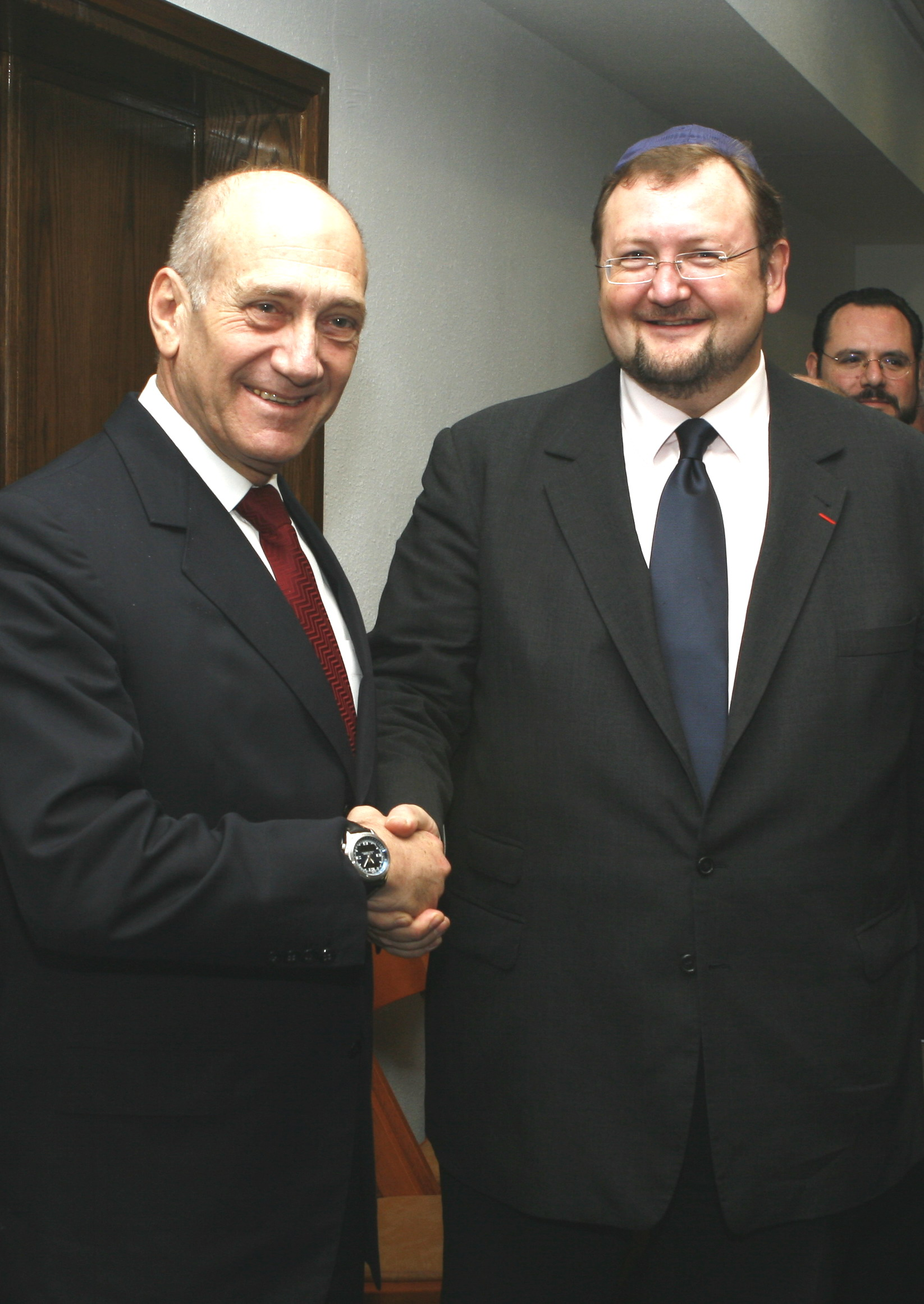 Israels Premierminister Ehud Olmert mit Rabbiner Walter Homolka